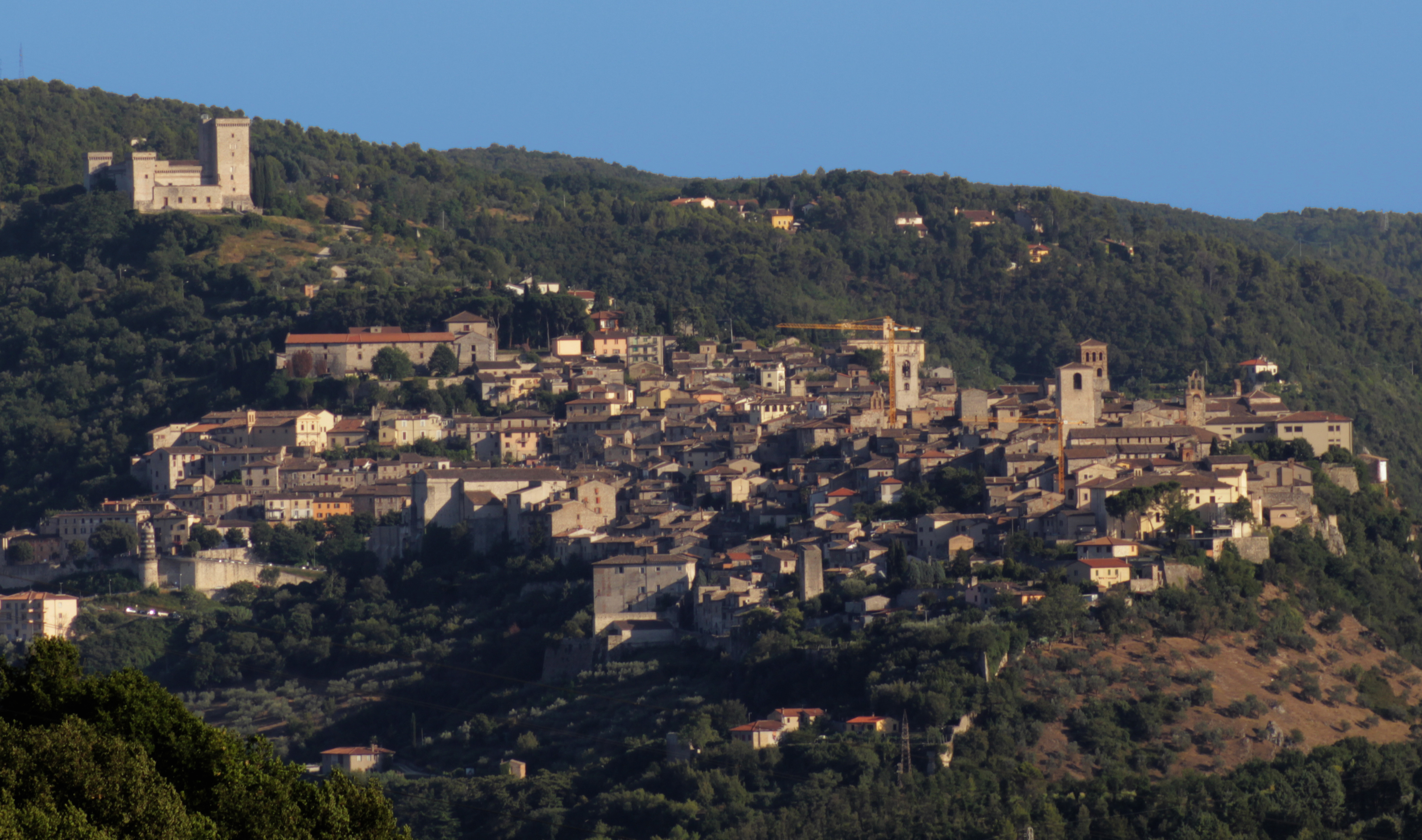 Panorama completo della città di Narni sovrastata dall'imponente Rocca dell'Albornoz. E' possibile ammirare in un colpo solo quasi tutti i campanili della città.